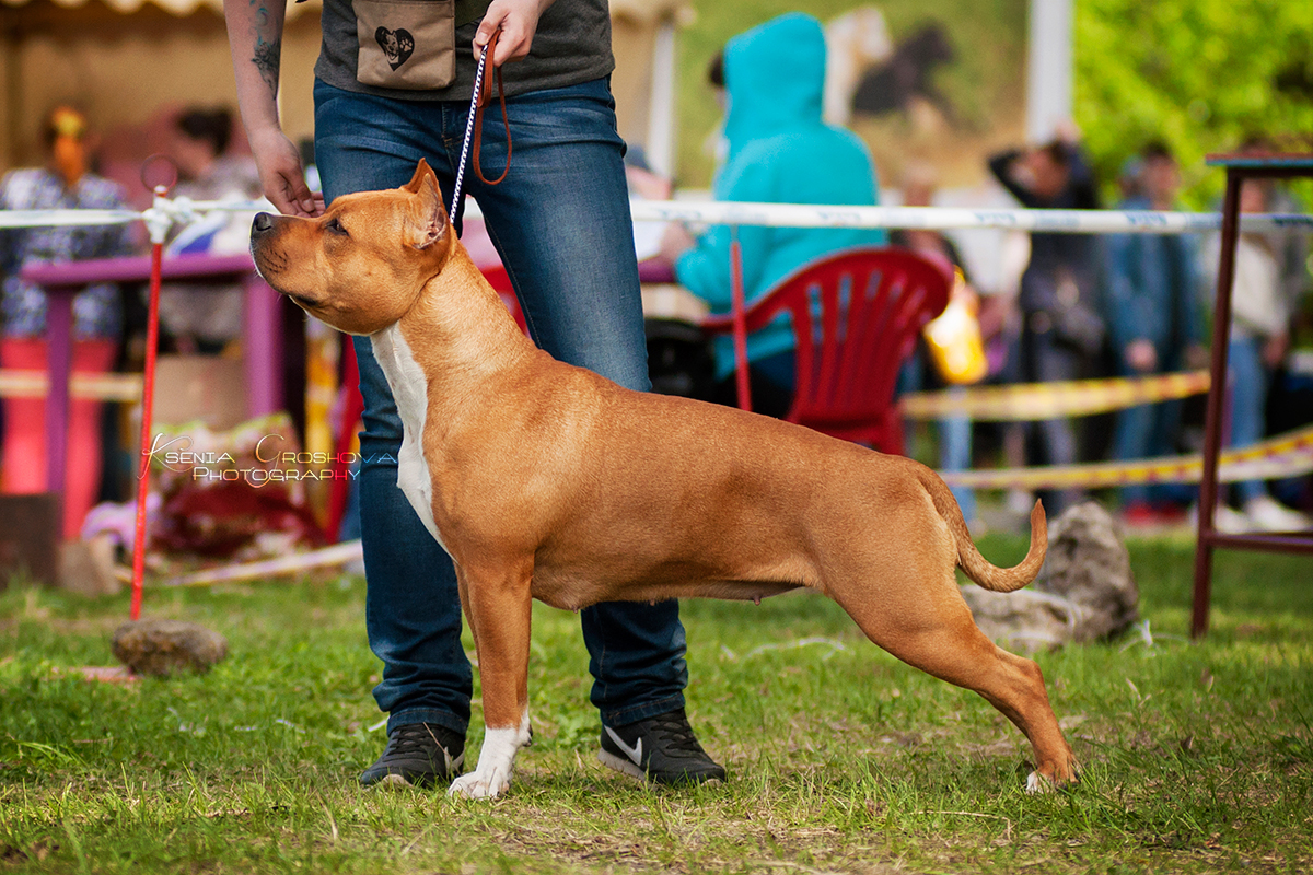 Выставка собак Челябинск 2017